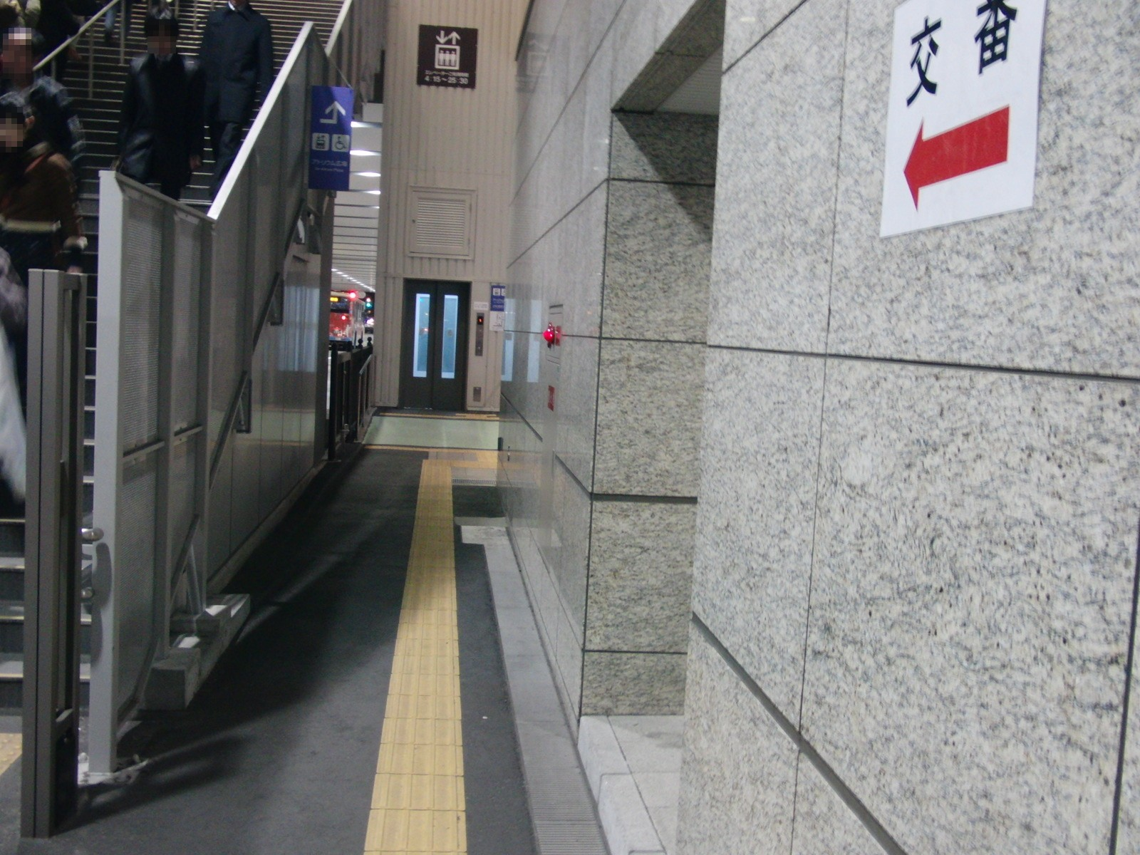 ヨドバシ梅田側にあるエレベーターを撮影